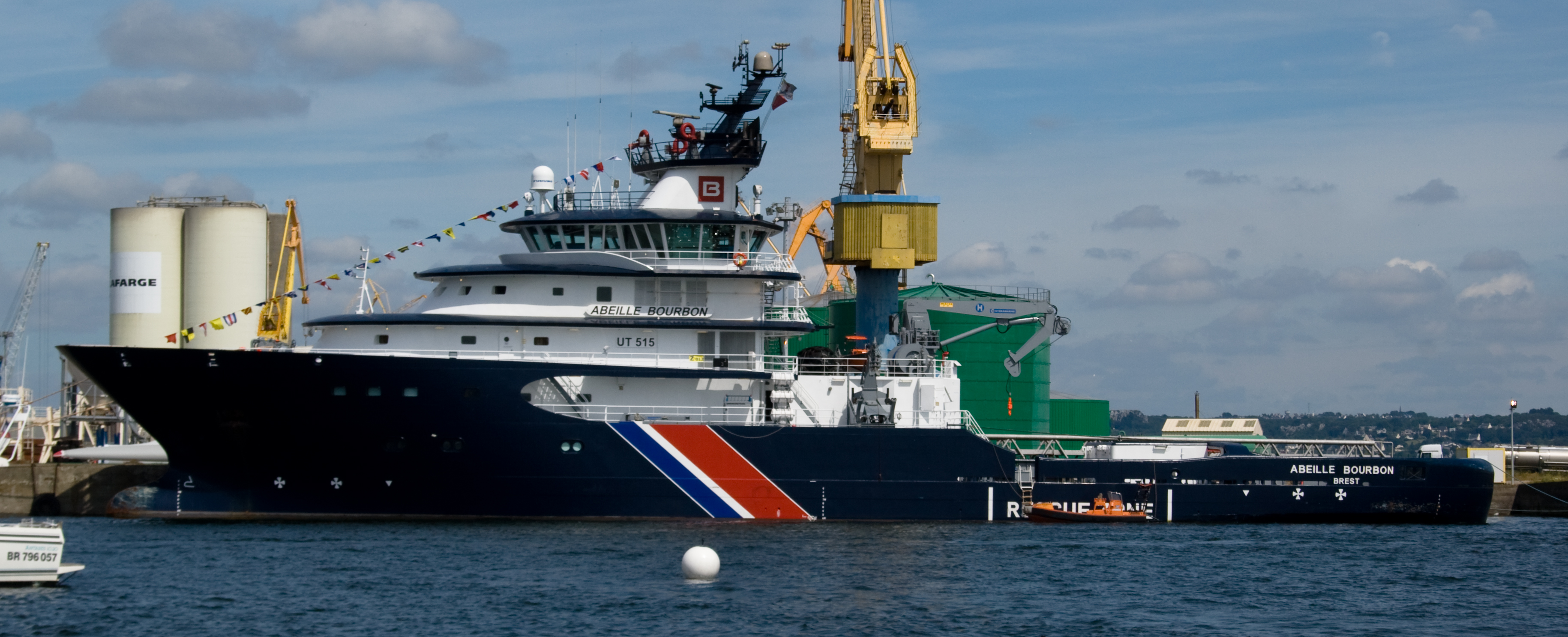 Abeille Bourbon, Brest 2008.